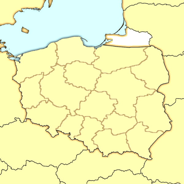 a blank map of Kaliningrad Oblast